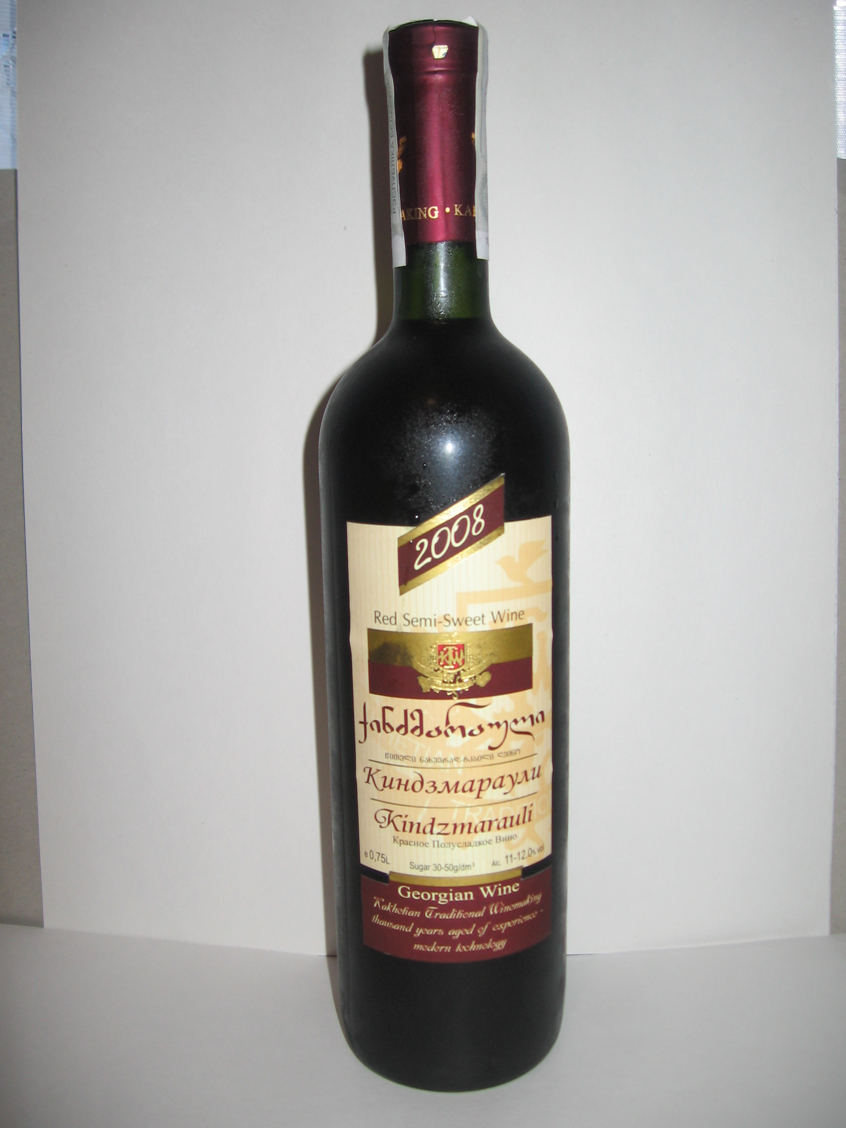 Бутылка грузинского вина "Киндзмараули".